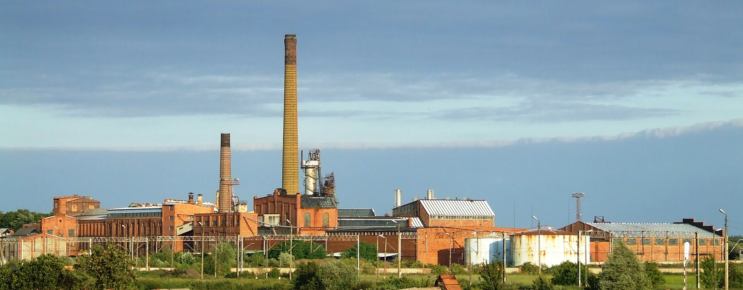 Nieczynna cukrownia w Witaszycach. Widok od strony Jarocina.